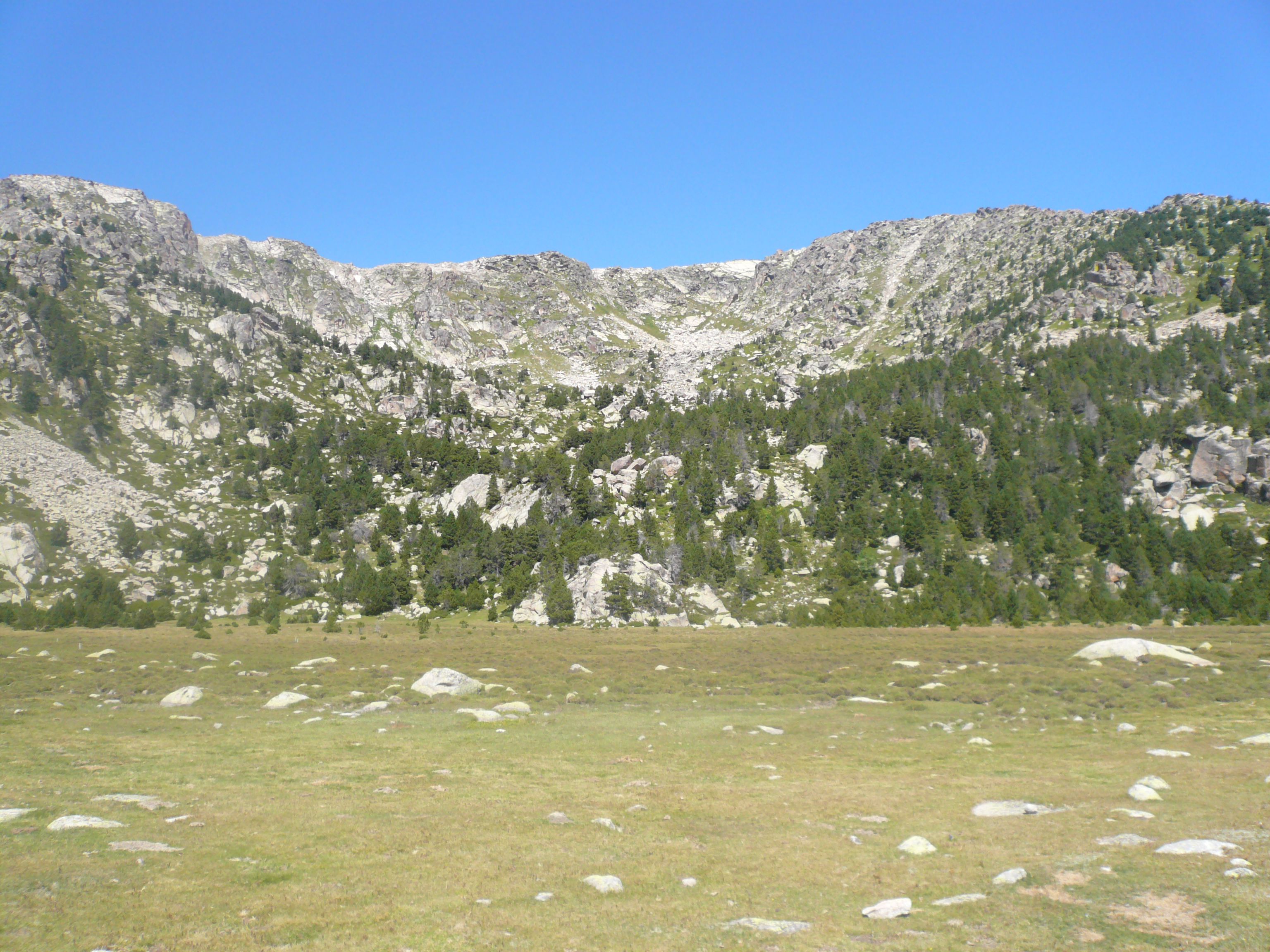 Tossa Plana de Lles-Puigpedrós (Cerdanya, Alt Urgell) (Lles de Cerdanya, les Valls de Valira, Meranges i altres). Fotos preses en una excursió del refugi de Malniu als estanys de Malniu i Mal. This is a a photo of a natural area in Catalonia, Spain, with id: ES510205 Object location42° 27′ 00″ N, 1° 42′ 00″ E